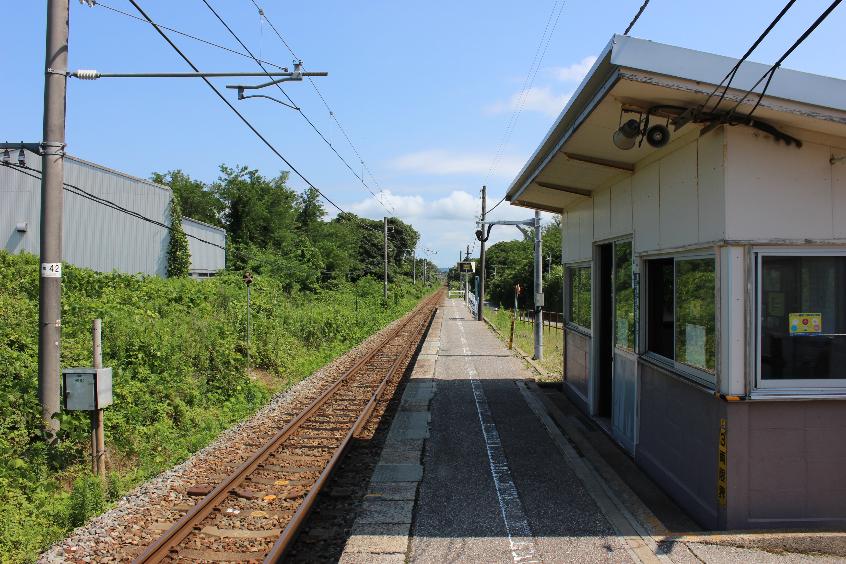 南羽咋駅の待合室・ホーム Canon EOS Kiss X5